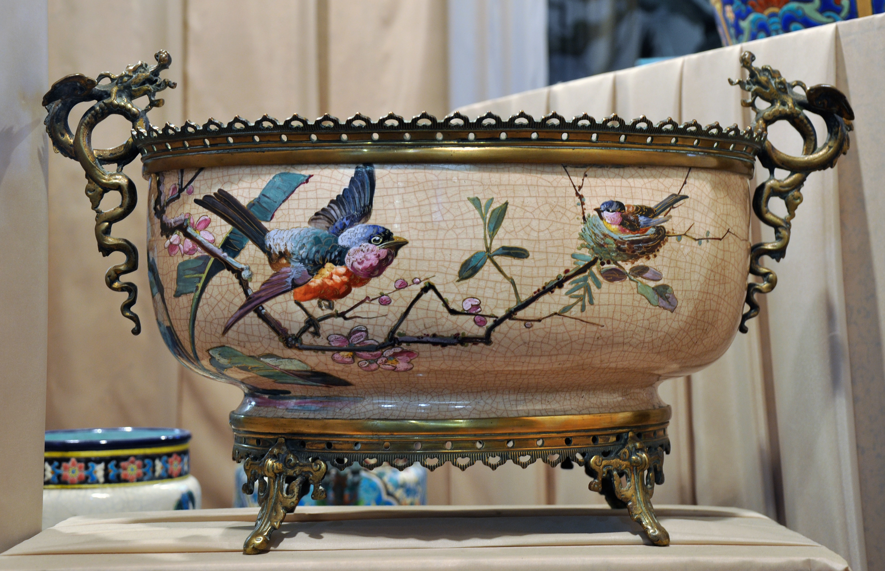 Rafraîchissoir avec oiseaux, 19ème siècle, émaux de Longwy. Musée municipal de Longwy.